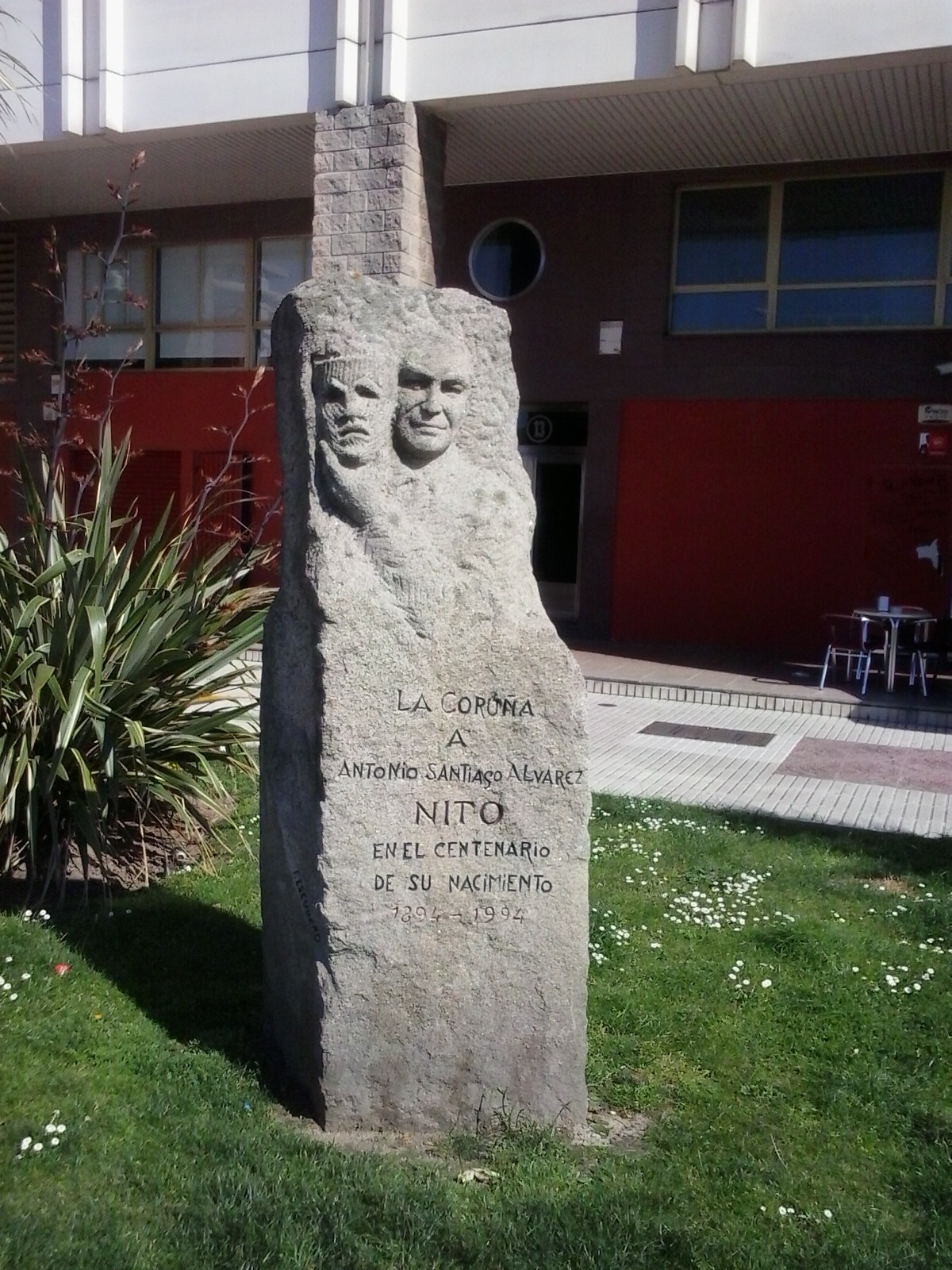 Homenaxe a Antonio Santiago Álvarez no paseo marítimo da Coruña